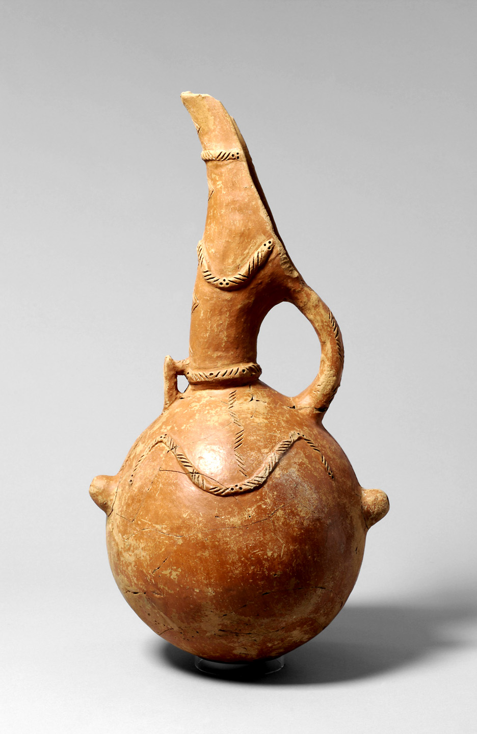 Kanna i rödpolerad III vara med reliefdekor som liknar ormar. Från en grav vid Lapithos, ca.1900 f.Kr. Invandrare till Cypern under bronsåldern påverkade både hantverk och teknik. Denna kalebassliknande kruka påminner om keramik från det samtida Anatolien.